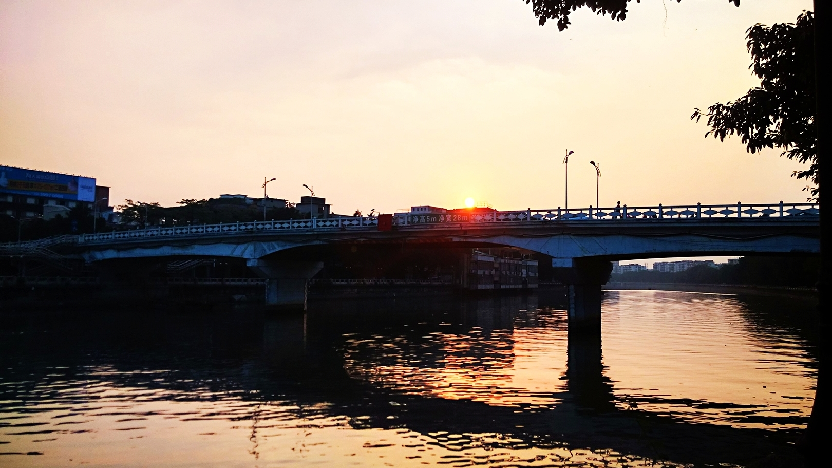 市桥大桥2015